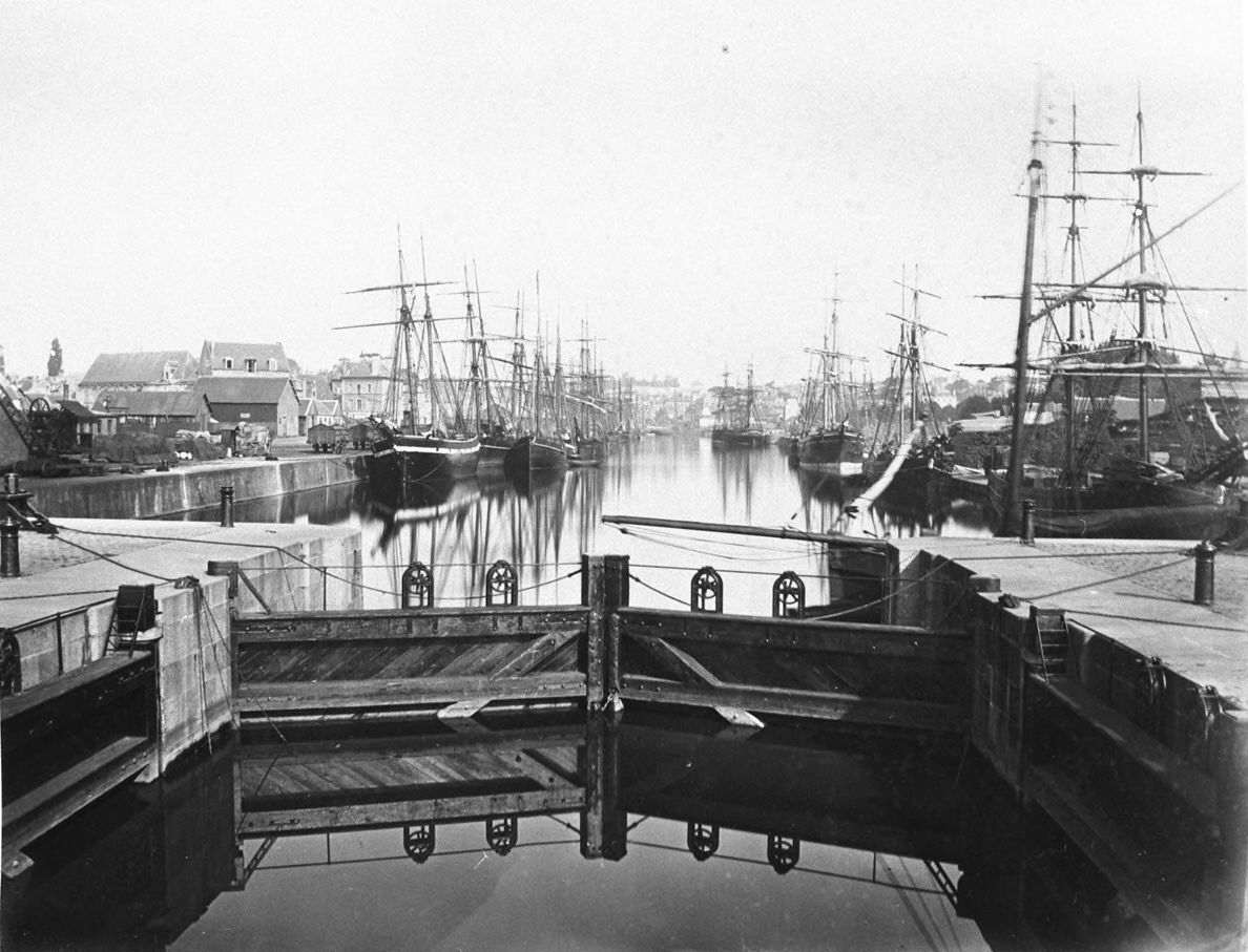 Photographie des écluses reliant le bassin Saint-Pierre (port de Caen) à l'Orne, intitulée à l'origine « Port de Caen » Extrait de l'ouvrage de J. Duclos, Ille-et-Vilaine, Mayenne, Calvados, Manche : photographies, École nationale des ponts et chaussées, Paris, 1873